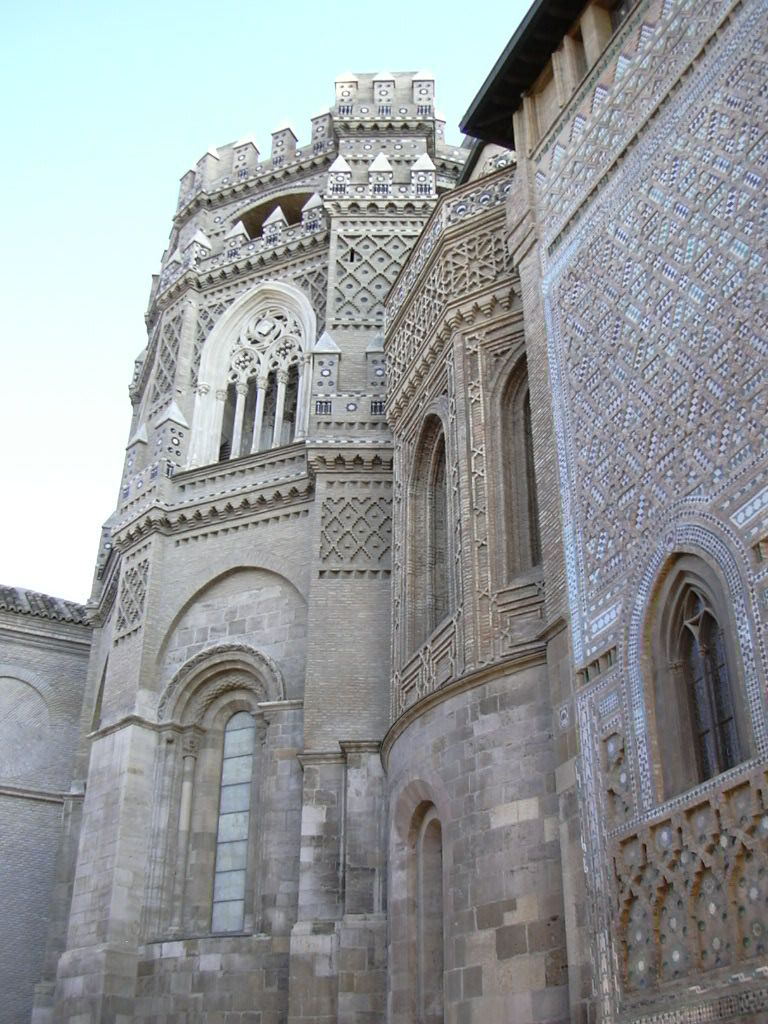 La Seo, ábside